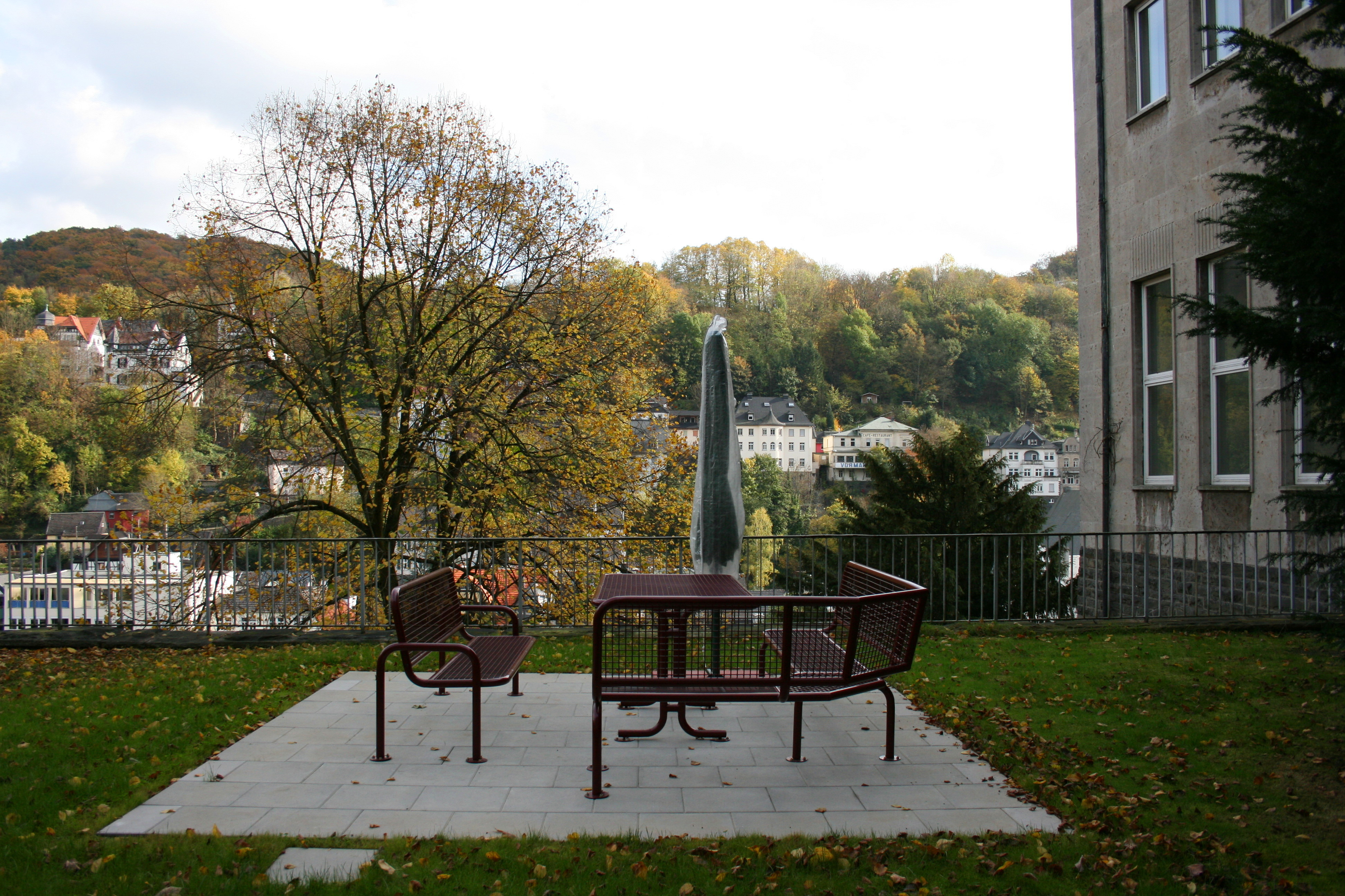 Kreishaus II in Altena